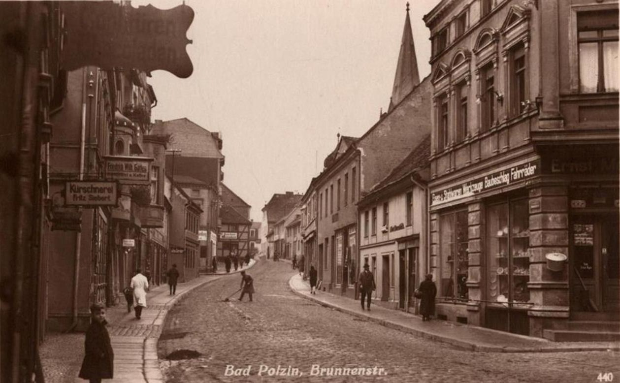 Połczyn Zdrój (Bad Polzin). Ulica 5 Marca, do 1945 r. Brunnenstrasse. W głębi po lewej stronie dom Levych